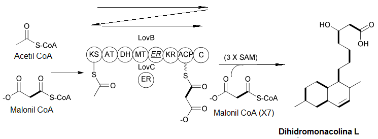 Esquema biosintético de la dihidromonacolina L por una PKS iterativa